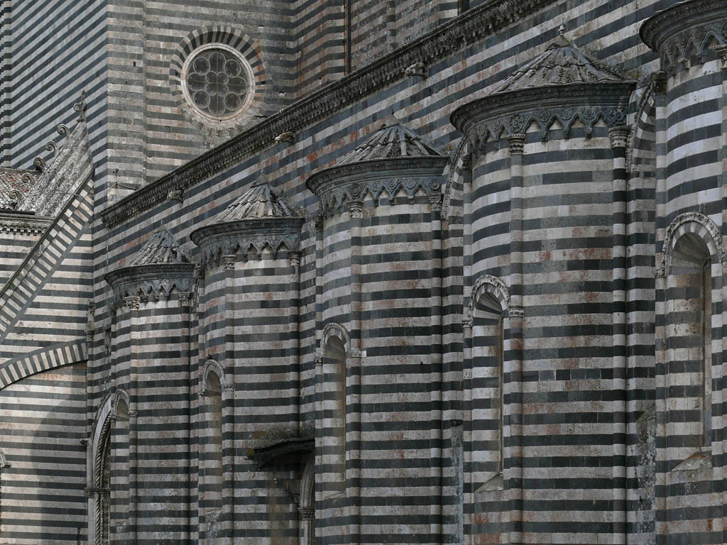 Orvieto: Duomo, side view